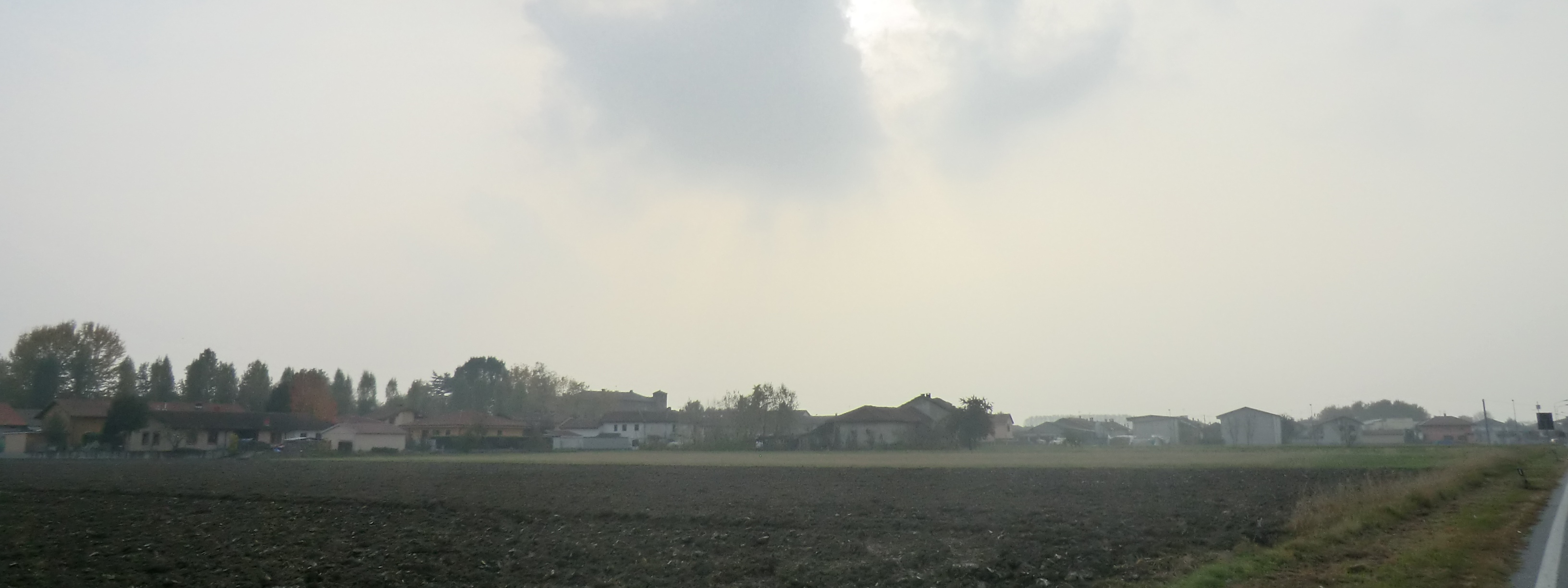 Villanova Solaro (Cuneo): panorama